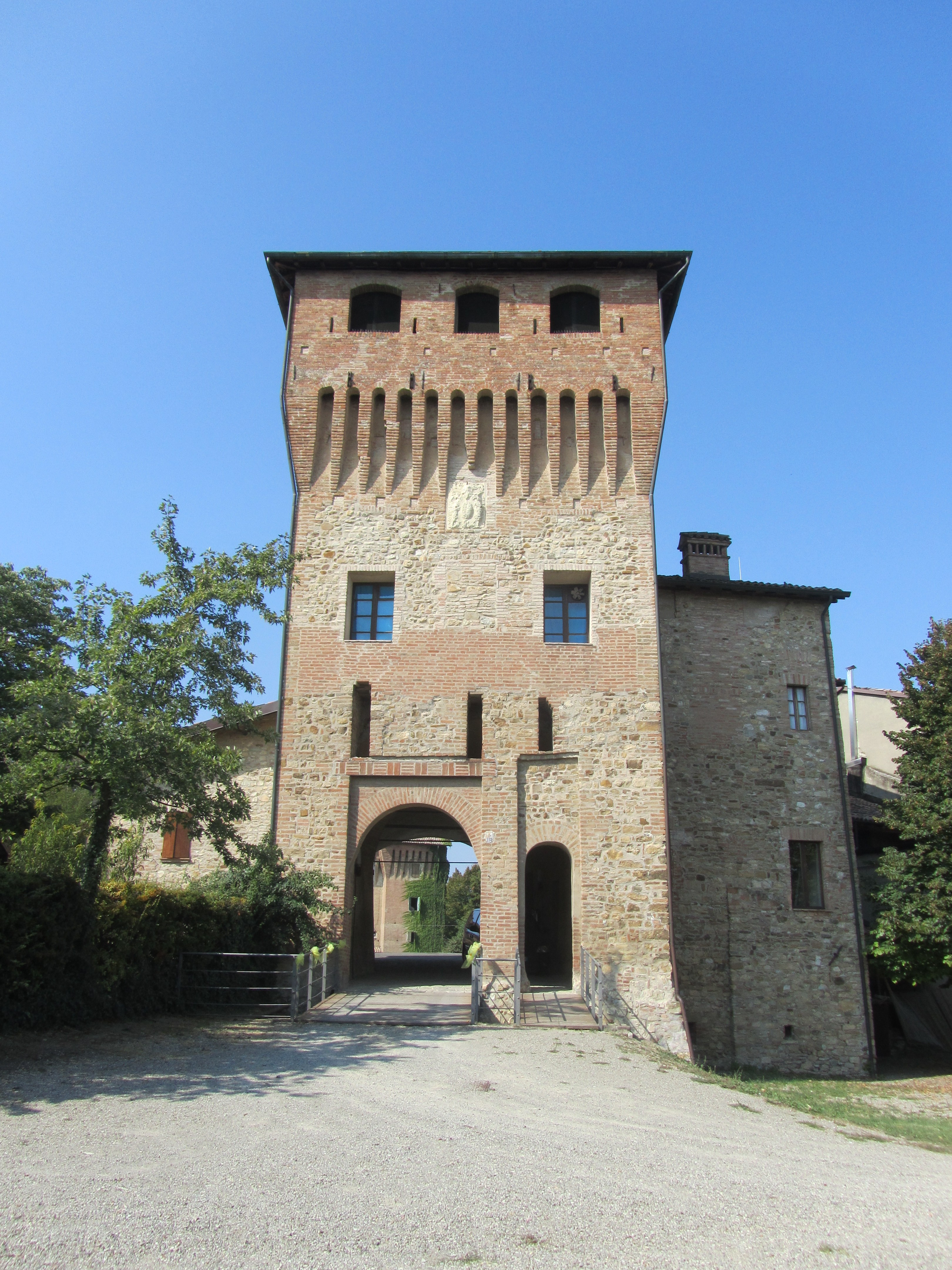 La torre d'ingresso del castello di Casalgrande, provincia di Reggio Emilia.